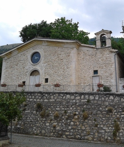 Chiesa di Santa Maria delle Grazie detta di Santa Gemma